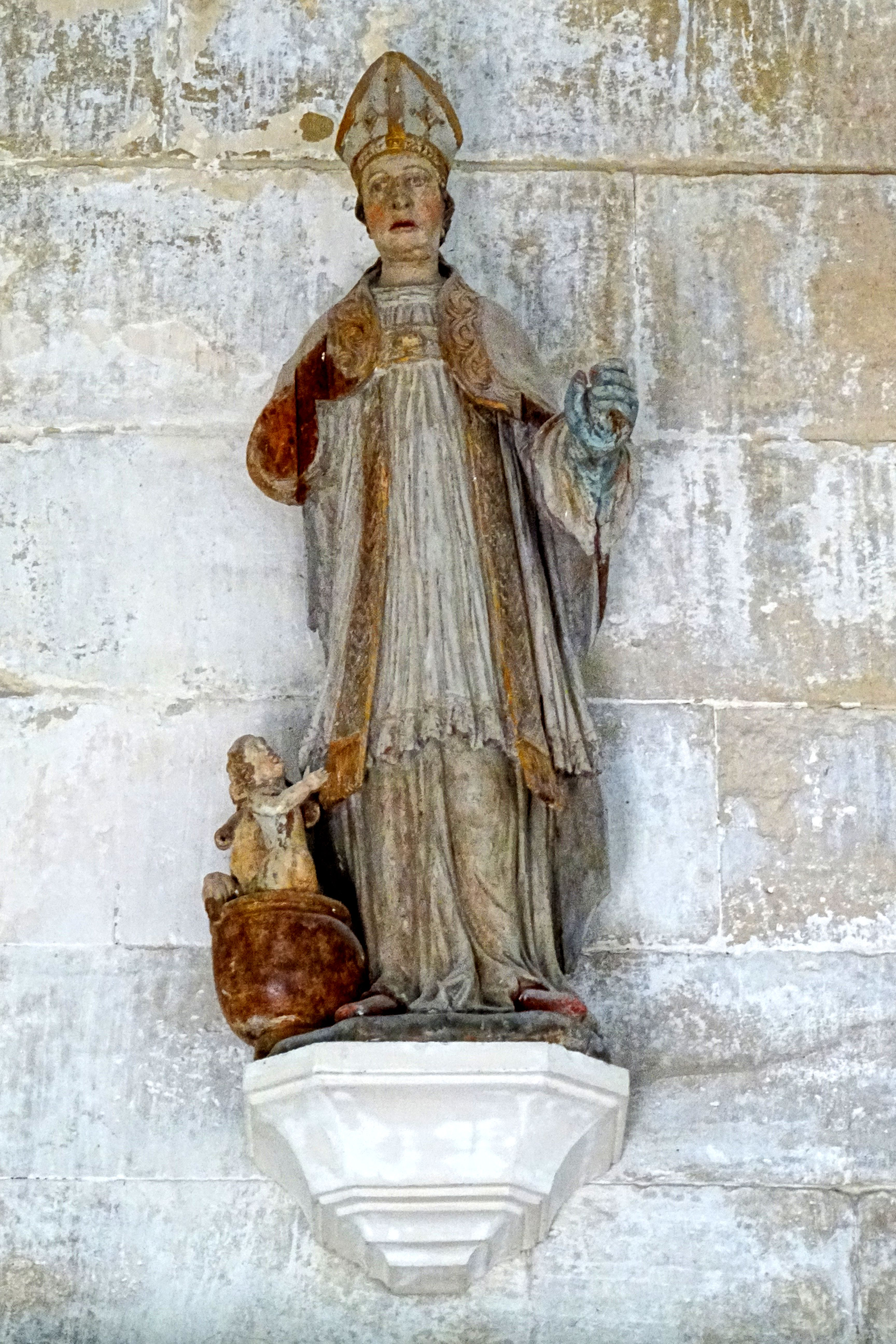 Statue de saint Nicolas.